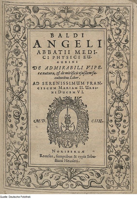 Original image description from the Deutsche Fotothek Zoologie & Schlange